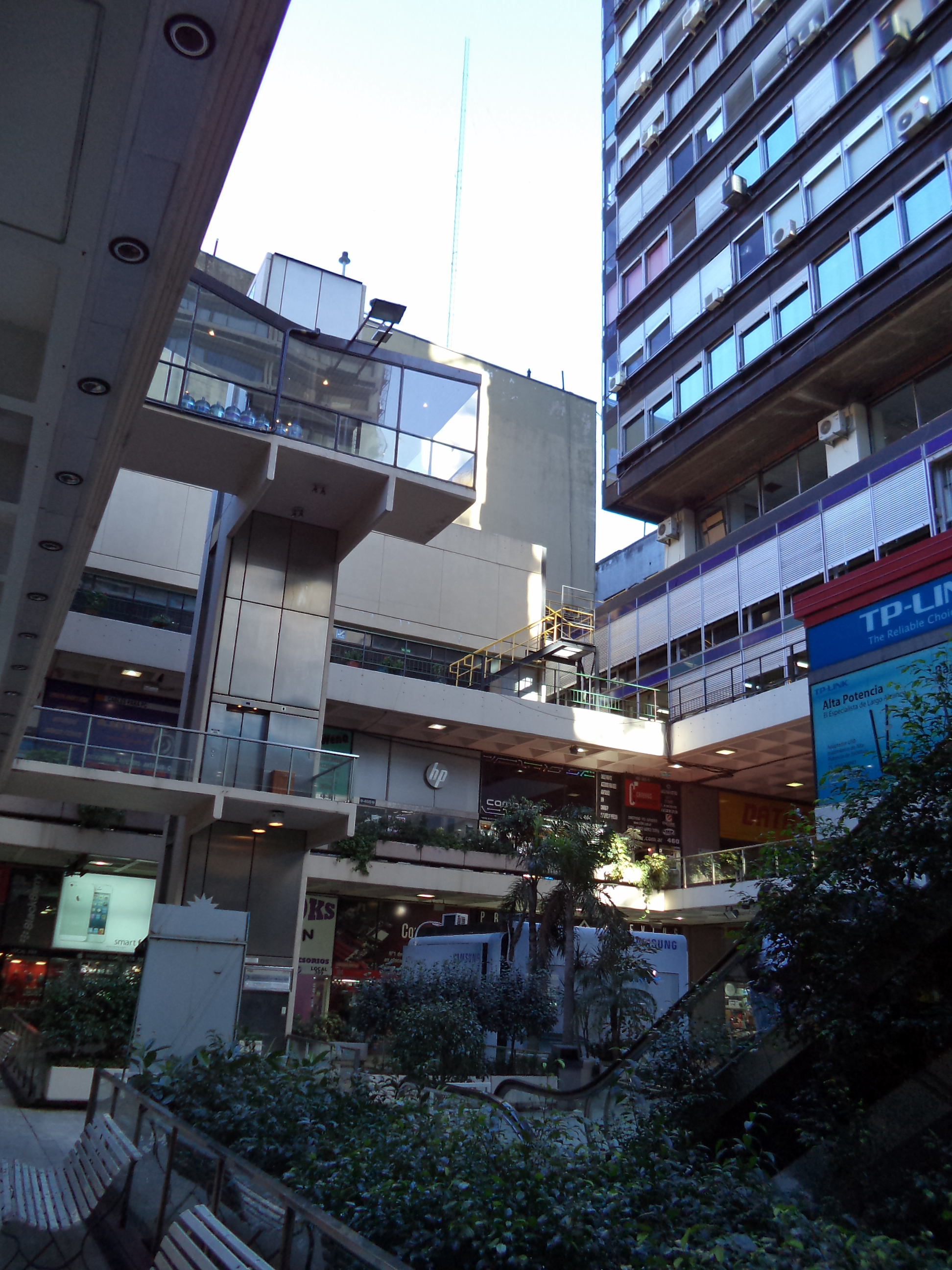 Interior de la Galería Jardin de Buenos Aires, con una de sus torres de oficinas y una columna que lleva dentro un ascensor.